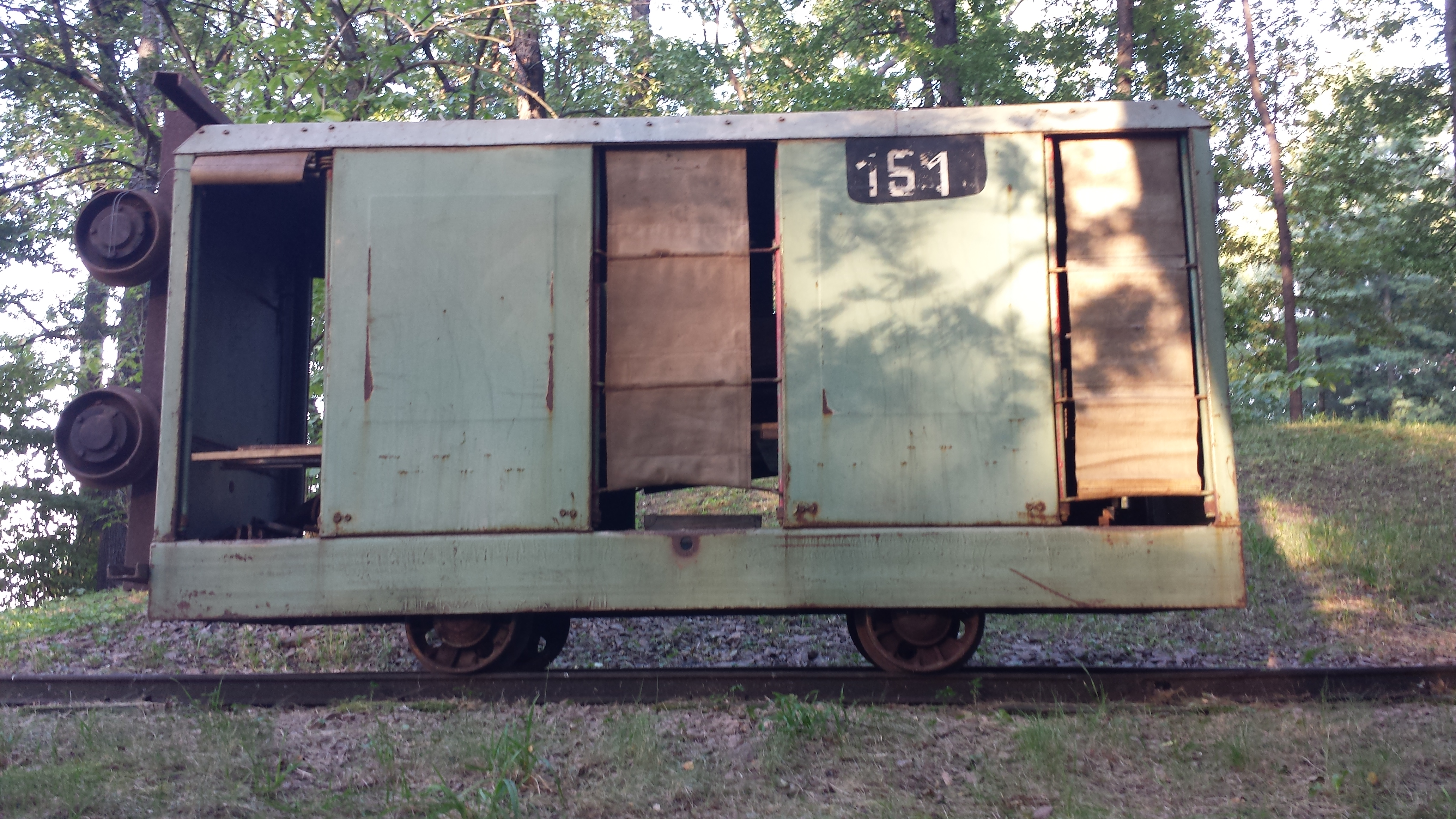 originaler Grubenbahnwagen